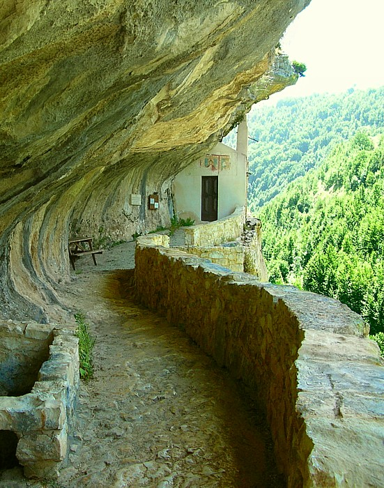 Roccamorice categorie:Afbeelding Abruzzen